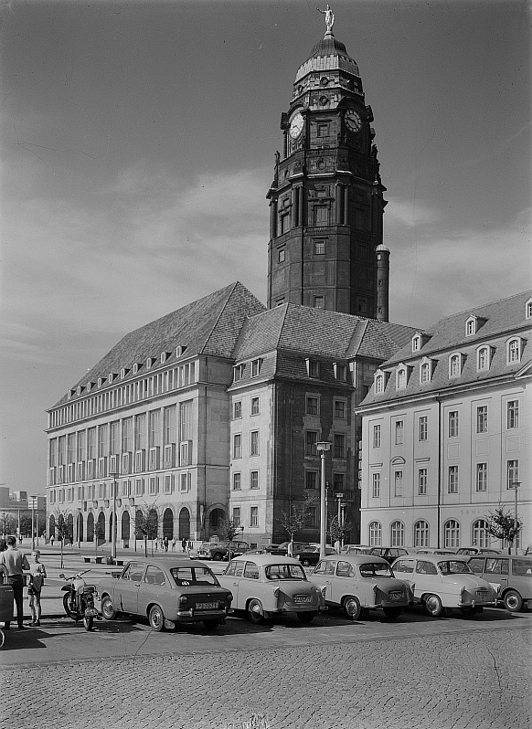 Original image description from the Deutsche FotothekDresden. Neues Rathaus und Teilansicht Gewandhaus